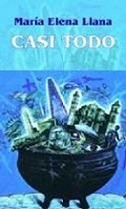 MaríaELL7